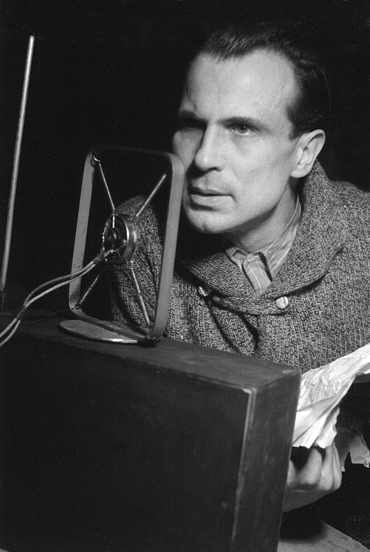 Original image description from the Deutsche FotothekSzenenbilder